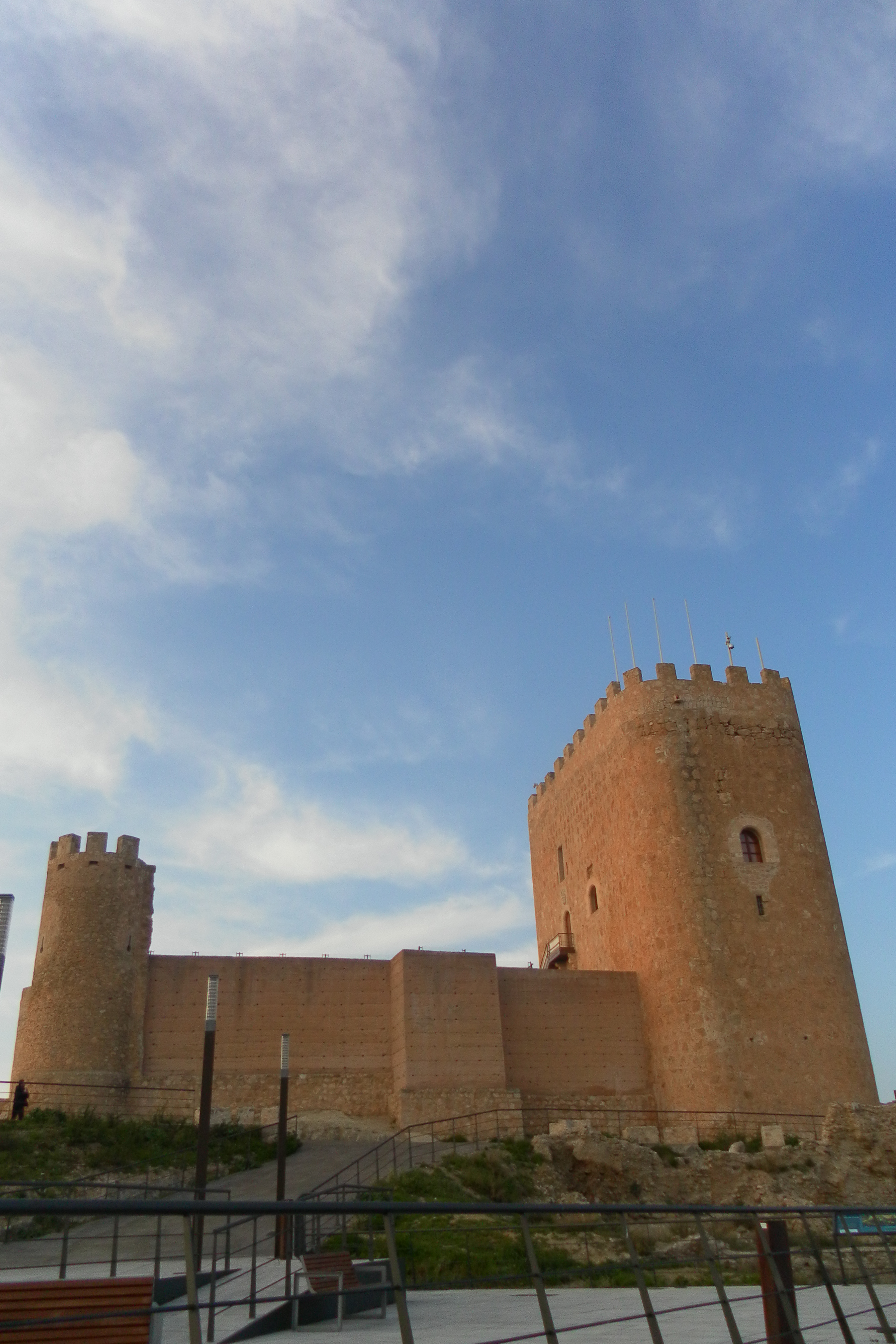 Castillo de Jumilla (Región de Murcia, España). Edificado a mediados del siglo XV sobre restos de otro anterior.